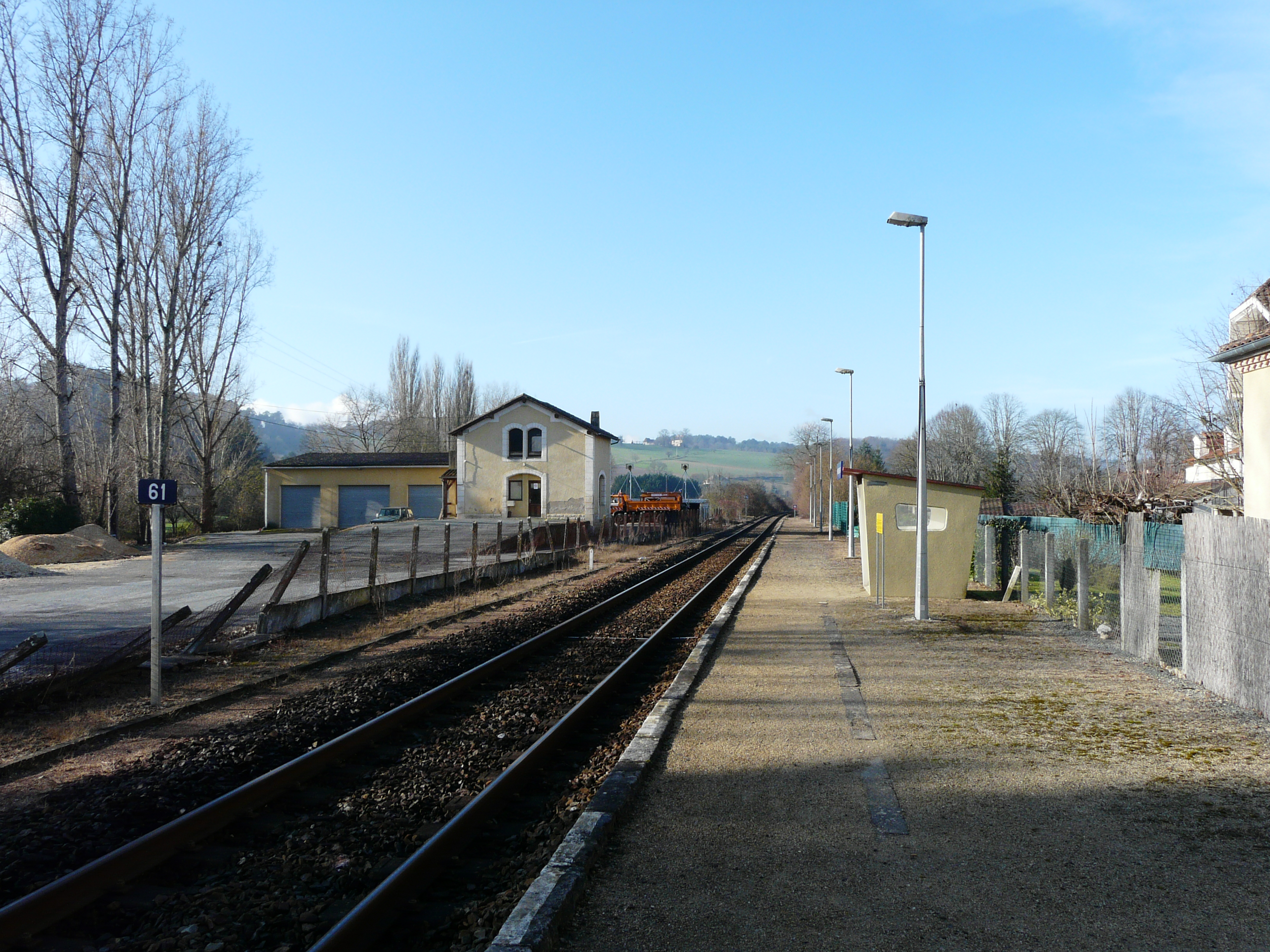 La voie en direction de Périgueux, en gare de Saint-Pierre-de-Chignac, Dordogne, France.